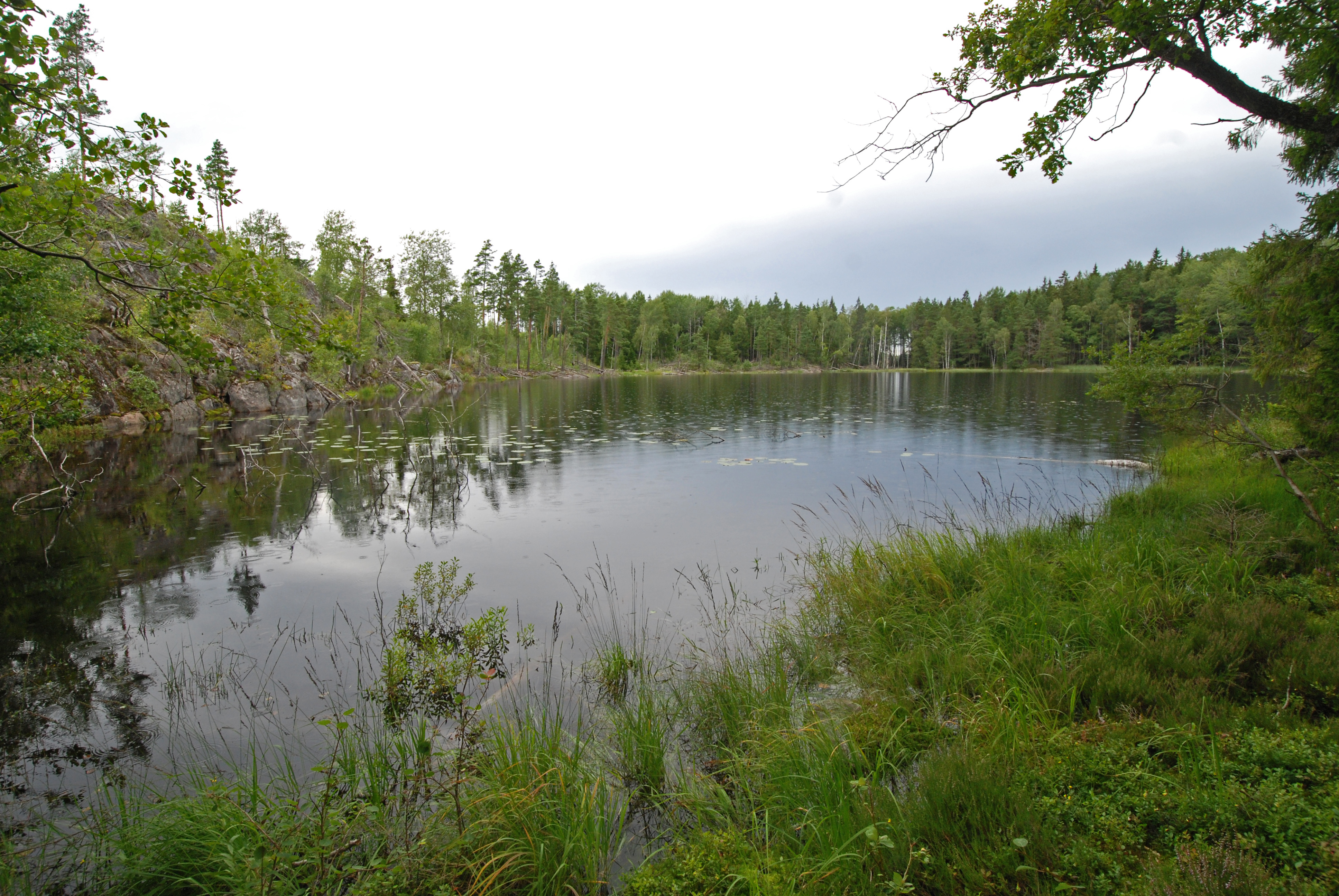 Mörtsjön, Tyresta